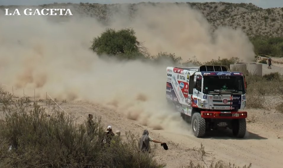 Dakar 2017. Tucumán (Argentina). Captura de La Gaceta (Mirá las máquinas del Dakar en su paso por Tucumán).Martin Kolomy (Tatra)